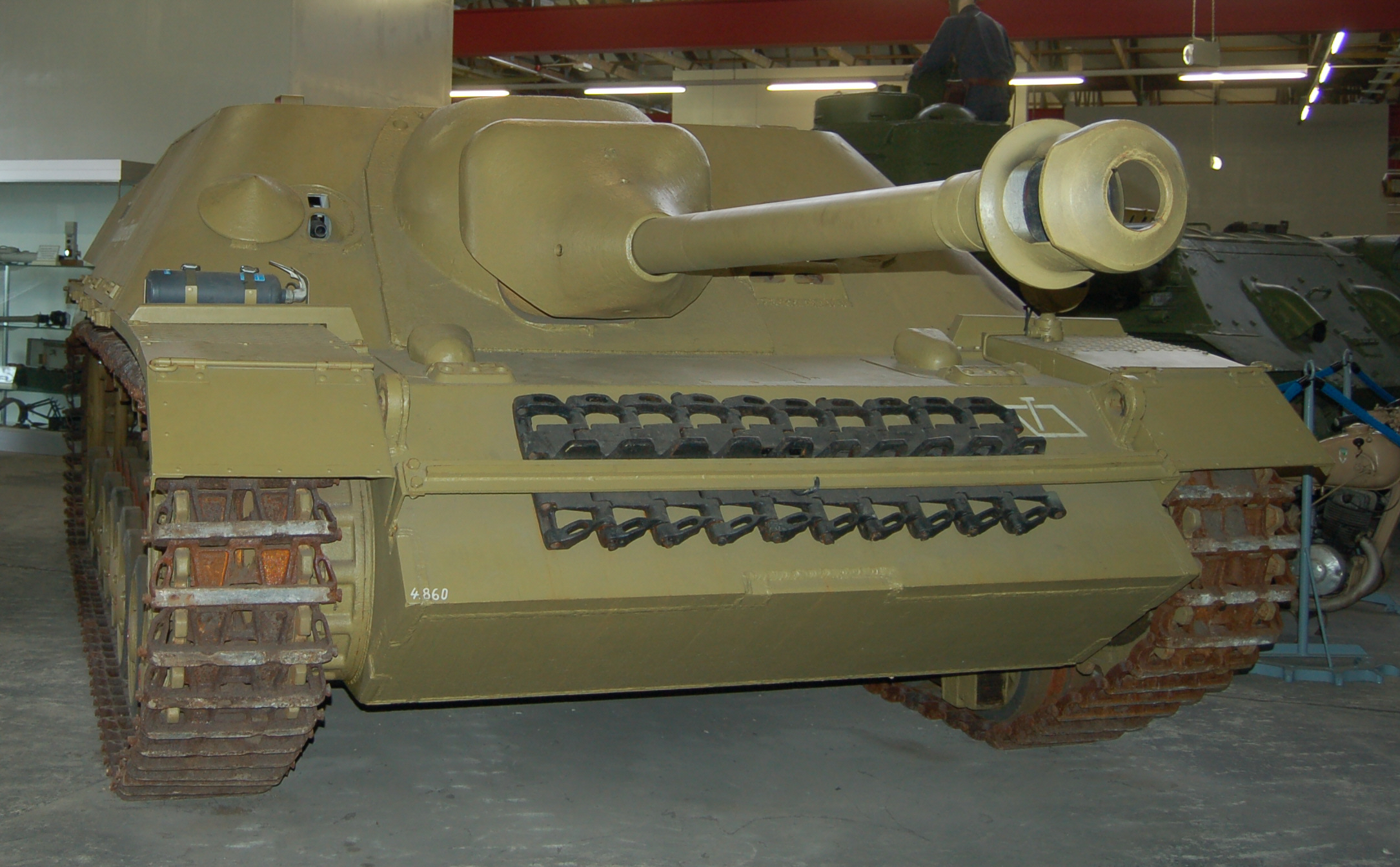 Jagdpanzer IV / "Panzerjäger 39" Versuchsfahrzeug (Fahrgestell-Nr. V 2) Besatzung: 5 Soldaten Gewicht: 24 Tonnen Motorleistung: 221 kW (300 PS) Bewaffnung: 1 Pak 39 7,5 cm L/48 sowie 2 Bug MG 42 Kaliber: 7,92 mm x 57 Baujahr 1943 Stückzahl: 3